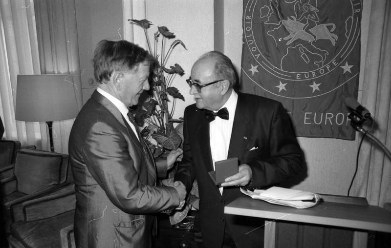 Minister des Bundestages Heinz Schwarz, CDU erhält aus der Hand des Präsidenten der Stiftung "Fondation du Mérite Européen", Dr. Dr. Francois Visine, für seine jahrzehntelanges Engagement für Europa den "Mérite Européen" in Gold - im Gebäude der Deutschen Parlamentarischen Gesellschaft. Laudatio: Prof. Dr. Wolfgang Bergsdorf.